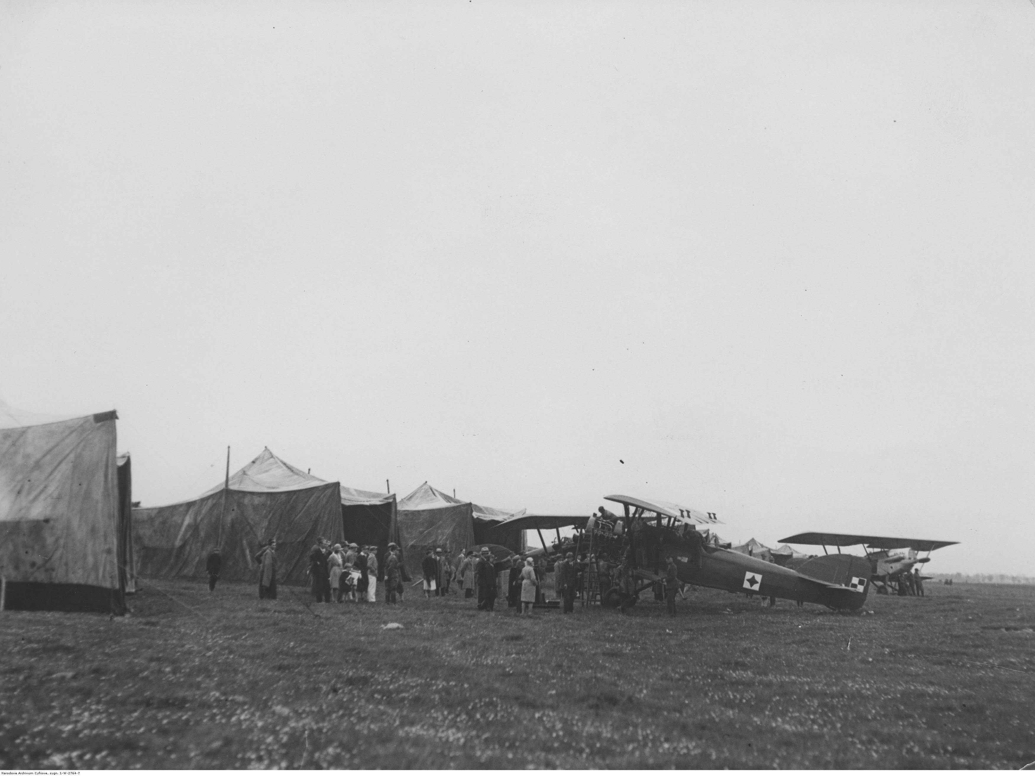 Samolot Potez 25 ze zdjętym okapotowaniem silnika podczas Tygodnia Ligi Obrony Powietrznej i Przeciwgazowej w Krakowie.